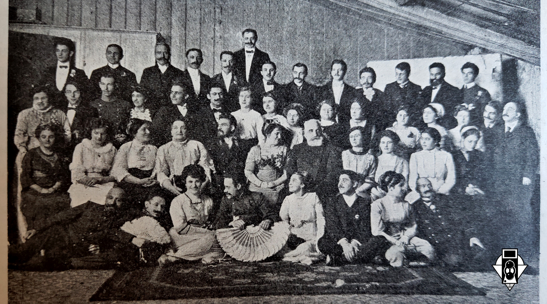 Загальні збори Одеського фотографічного товариства до 20-річчя заснування